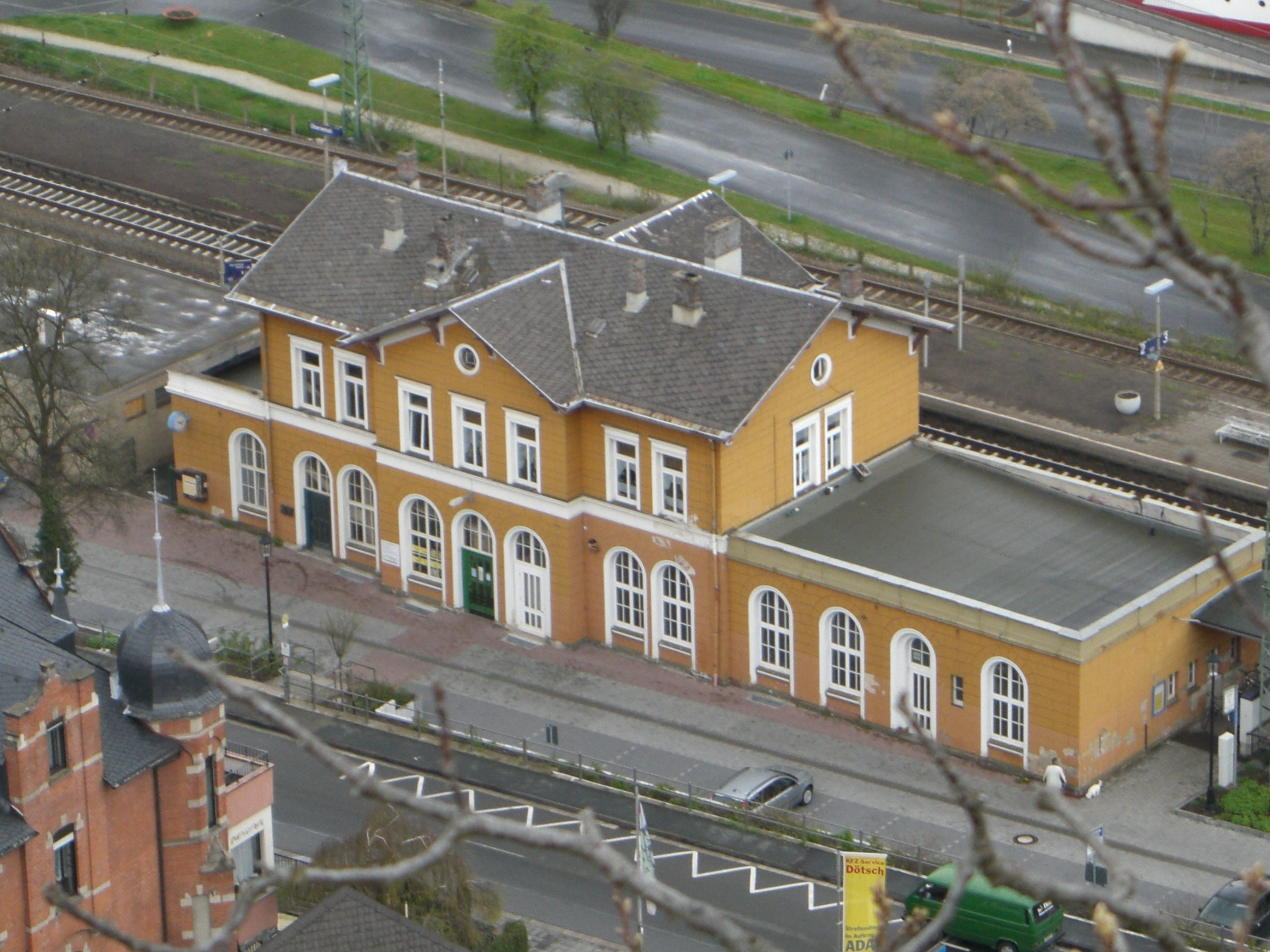 Bahnhof Oberwesel